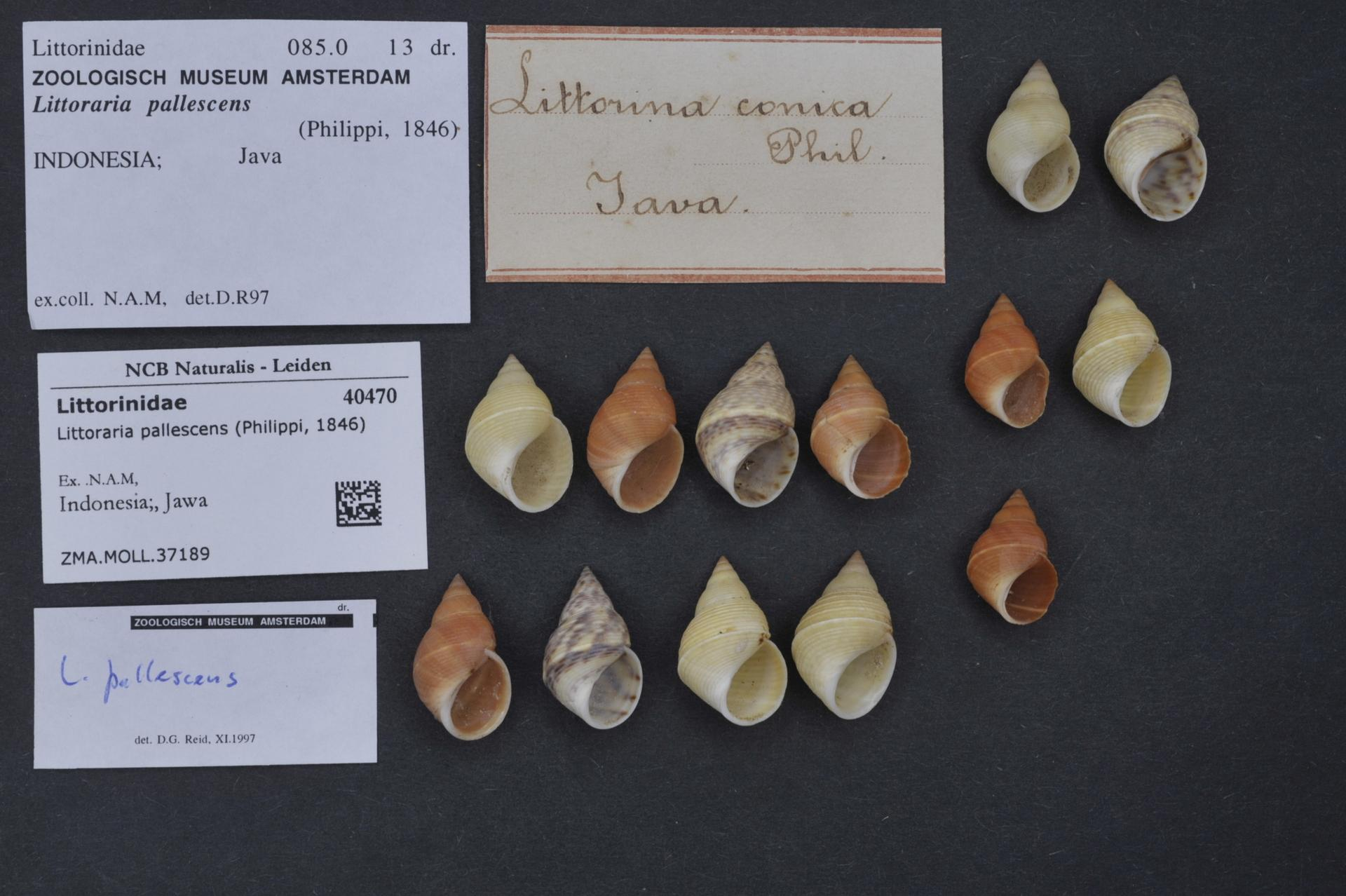 Littoraria pallescens (Philippi, 1846)